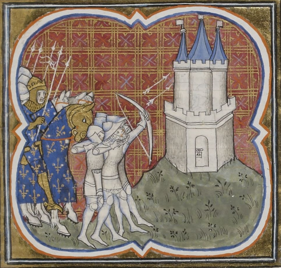 Siège de Melun par Robert le Pieux, roi de France. Enluminure des Grandes Chroniques de France, XIVe siècle. Paris, BnF, département des Manuscrits, Français 2813, folio 174 recto.